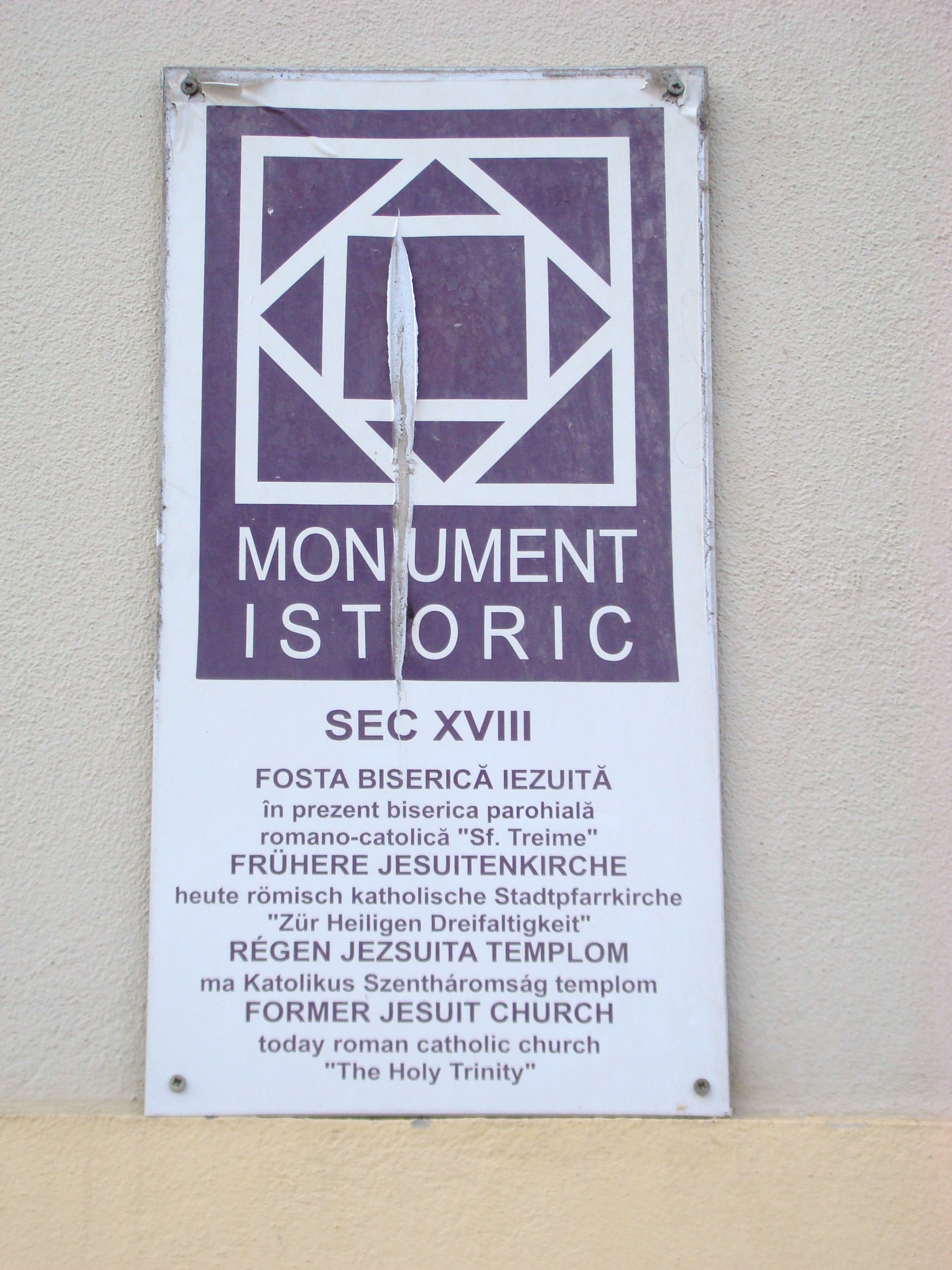 Biserica parohială romano-catolică din Sibiu